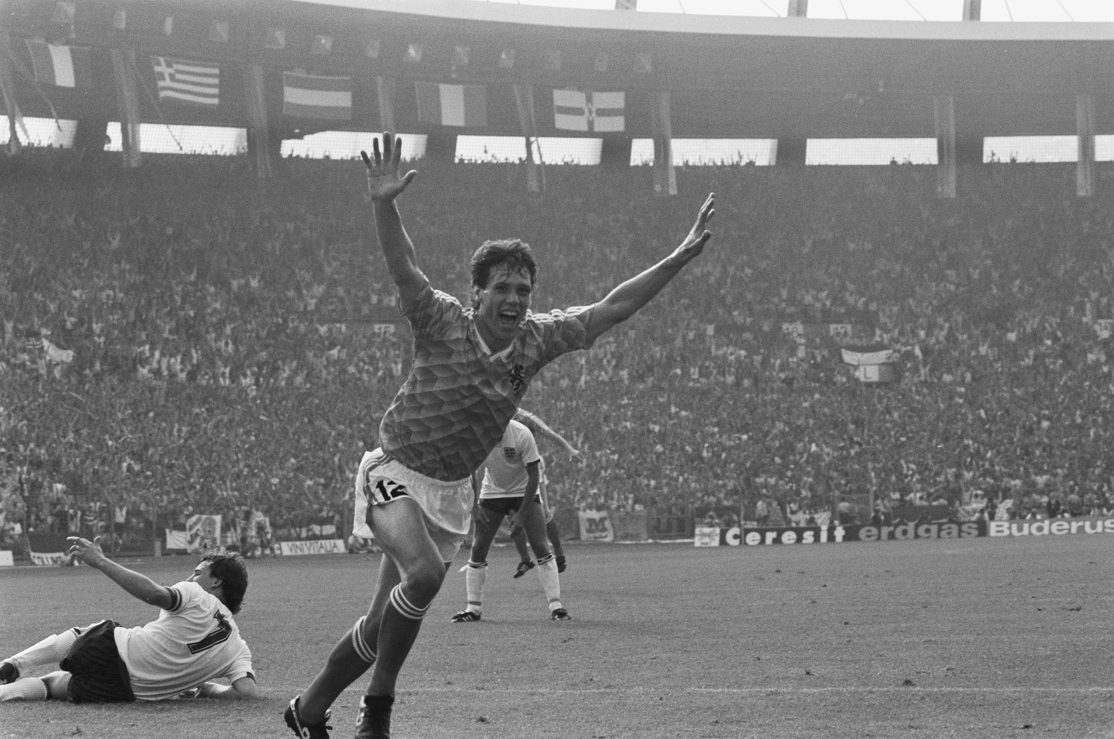 Collectie / Archief : Fotocollectie Anefo Reportage / Serie : [ onbekend ] Beschrijving : EK voetbal in West Duitsland ; Engeland tegen Nederland 1-3; Marco van Basten juicht nadat hij de 2e keer gescoord heeft Datum : 14 juni 1988 Locatie : Duitsland, Groot-Brittannië, Nederland Trefwoorden : sport, voetbal Persoonsnaam : Basten, Marco van Fotograaf : Bogaerts, Rob / Anefo Auteursrechthebbende : Nationaal Archief Materiaalsoort : Negatief (zwart/wit) Nummer archiefinventaris : bekijk toegang 2.24.01.05 Bestanddeelnummer : 934-2659